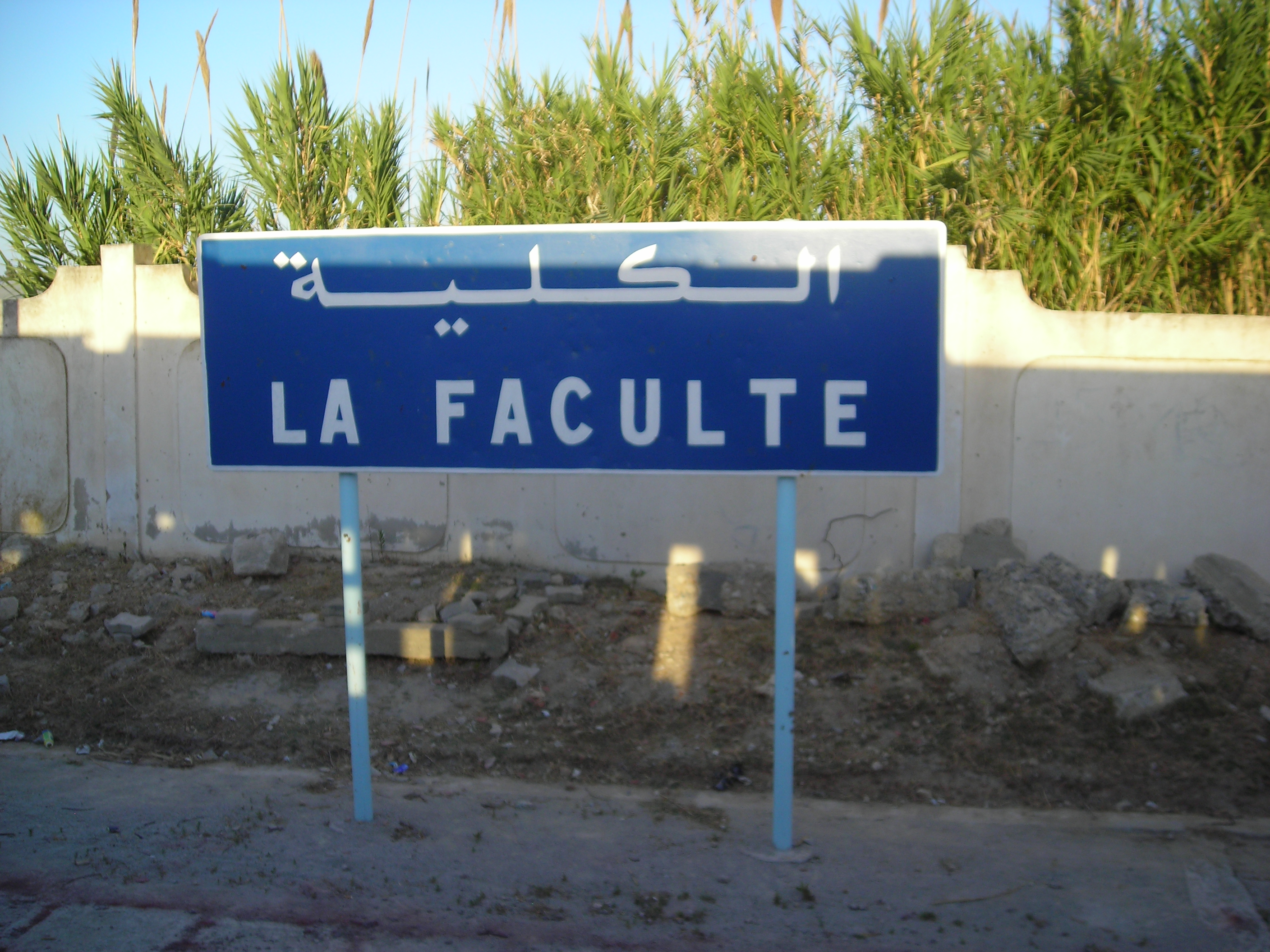 Station Metro du Sahel La Faculté